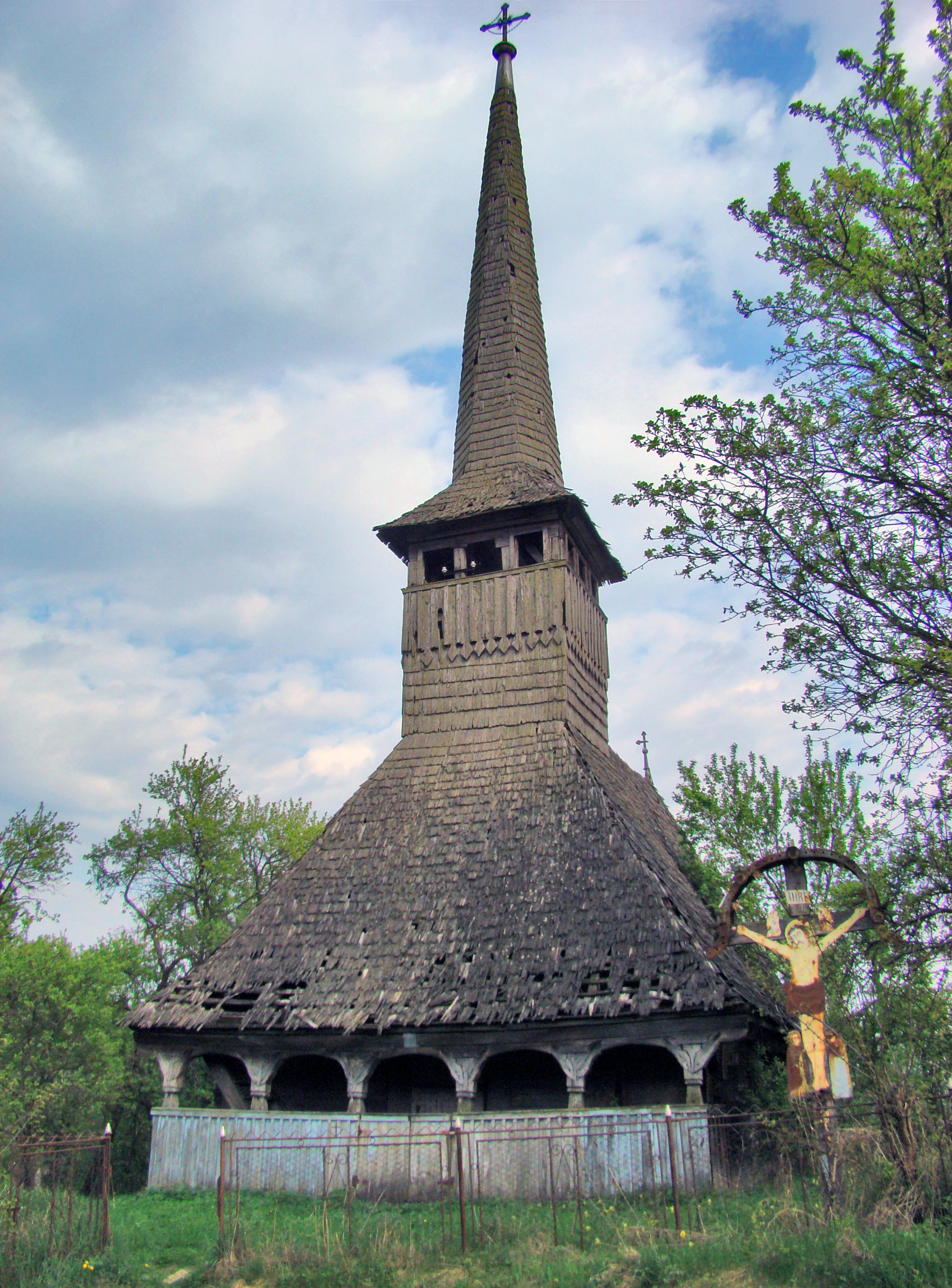 Biserica de lemn din Pintic, județul Cluj.